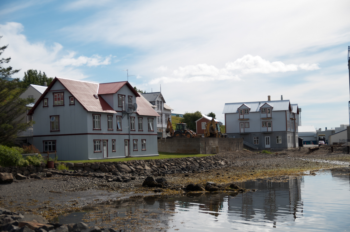 Franski spítalinn út í Hafnarnesi og í sinni upprunalegu mynd.